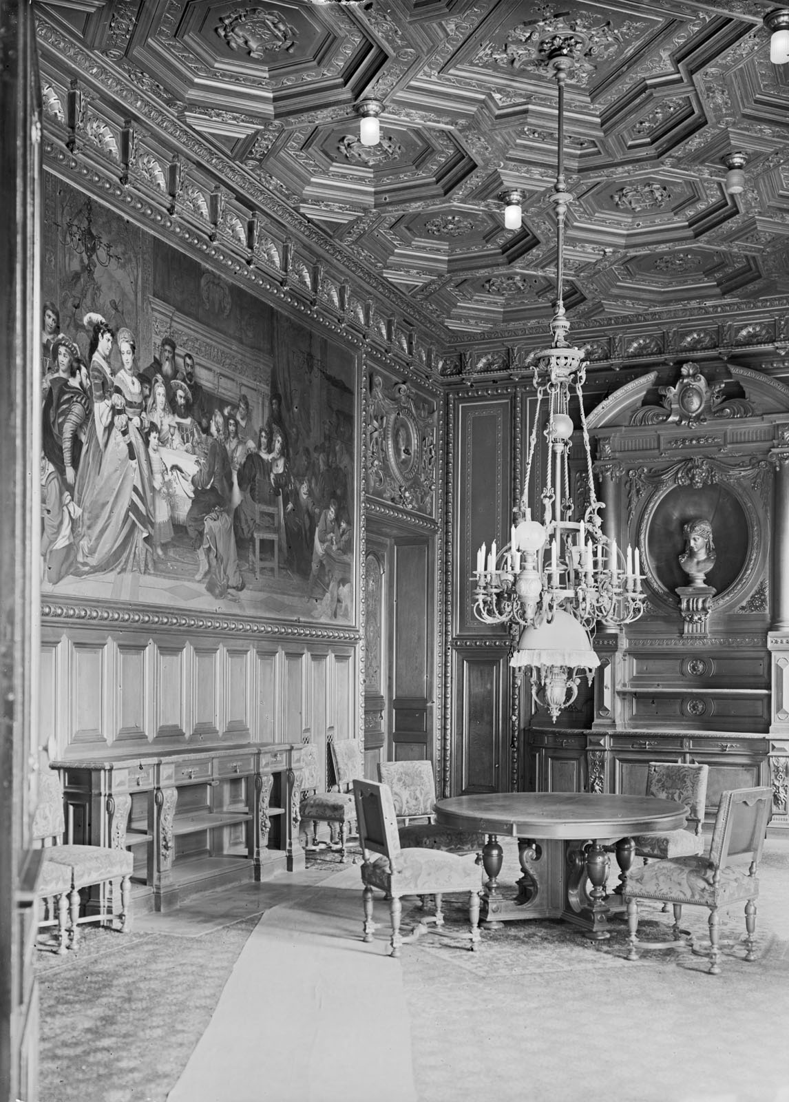 Innenansicht Speisesaal im 1. Stock mit Wandgemälde von Ernst Ferdinand Oehme. - Palais Oppenheim (Palais Kaskel-Oppenheim) war ein Gebäude im Stil der Neorenaissance in Dresden. Es wurde 1845 bis 1848 von Gottfried Semper für den Bankier Martin Wilhelm Oppenheim (1781–1863) erbaut und befand sich an der Bürgerwiese 5–7. Photo vor 1939 SLUB/Deutsche Fotothek der Sächsische Landesbibliothek - Staats- und Universitätsbibliothk Dresden